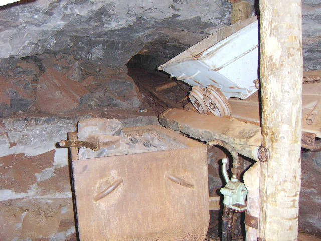 Die Sturzbühne war im Mansfelder Kupferschieferbergbau die allseits angewandte Methode des Umladens des Haufwerkes vom Hunt in den Förderwagen (hier eine Sturzbühne im Röhrigschacht).